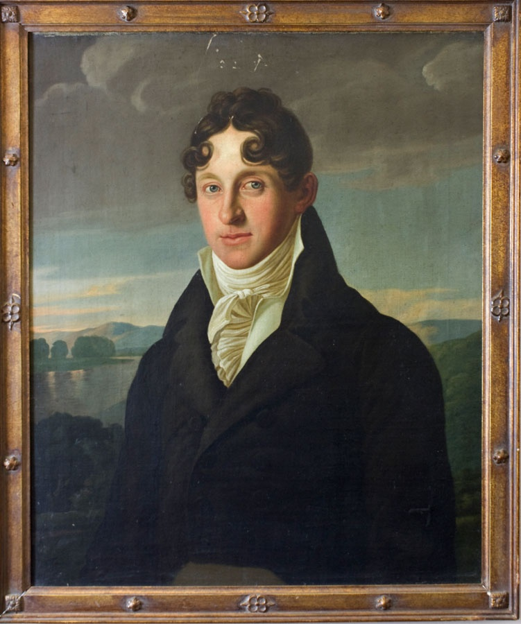 Christian Gottlob von Houwald (1781–1837), stellvertretender königlich-sächsischer Kreishauptmann, 1810 bis 1821 Landsyndikus der Niederlausitz